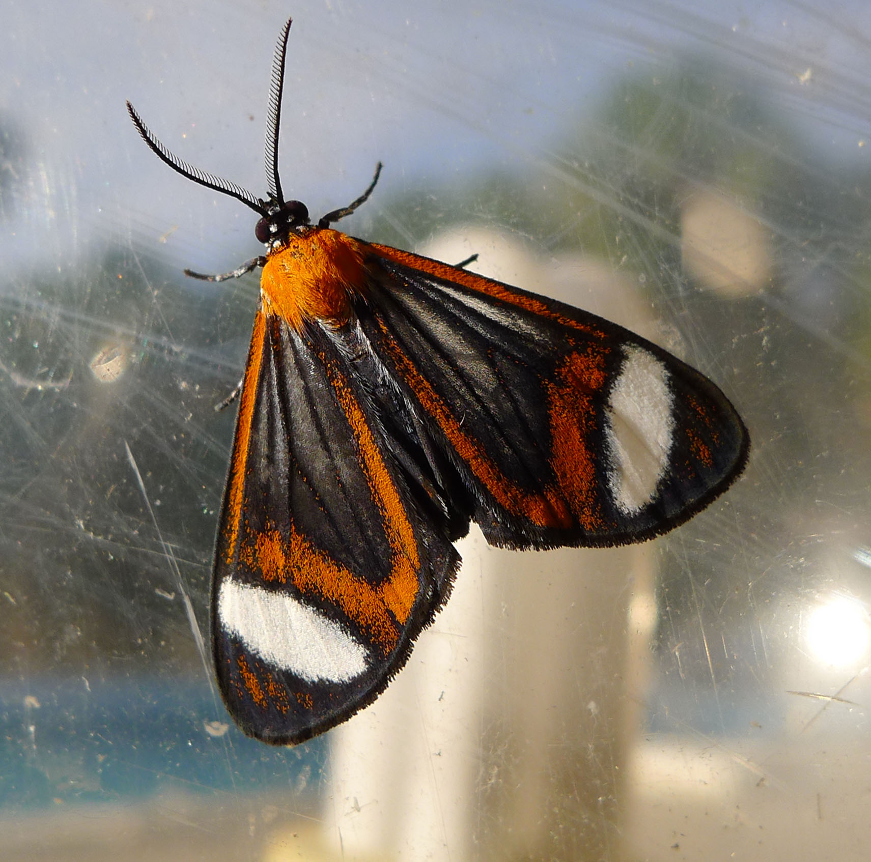 La Belen, Sierra de Najasa. Cuba